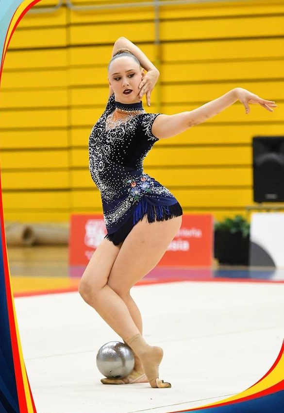 Adelina Fominykh en un control previo a la Copa de la Reina durante el Trofeo IV Estaciones Primavera en Arganda del Rey (Madrid) el 10 de marzo de 2018.